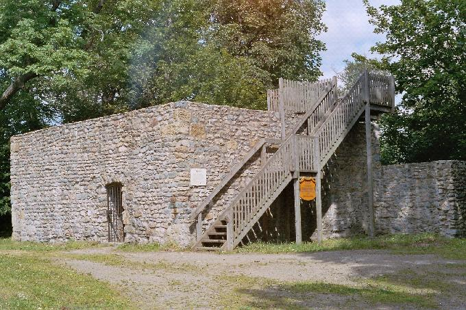 Turmnachbau auf der Harzburg